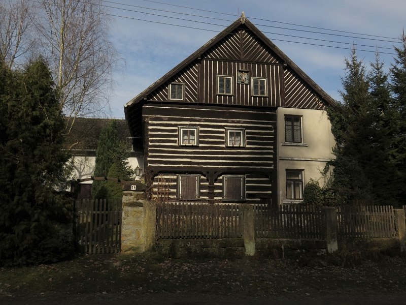 Usedlost čp. 14, Nová Skalka 14, Skalka u Doks.